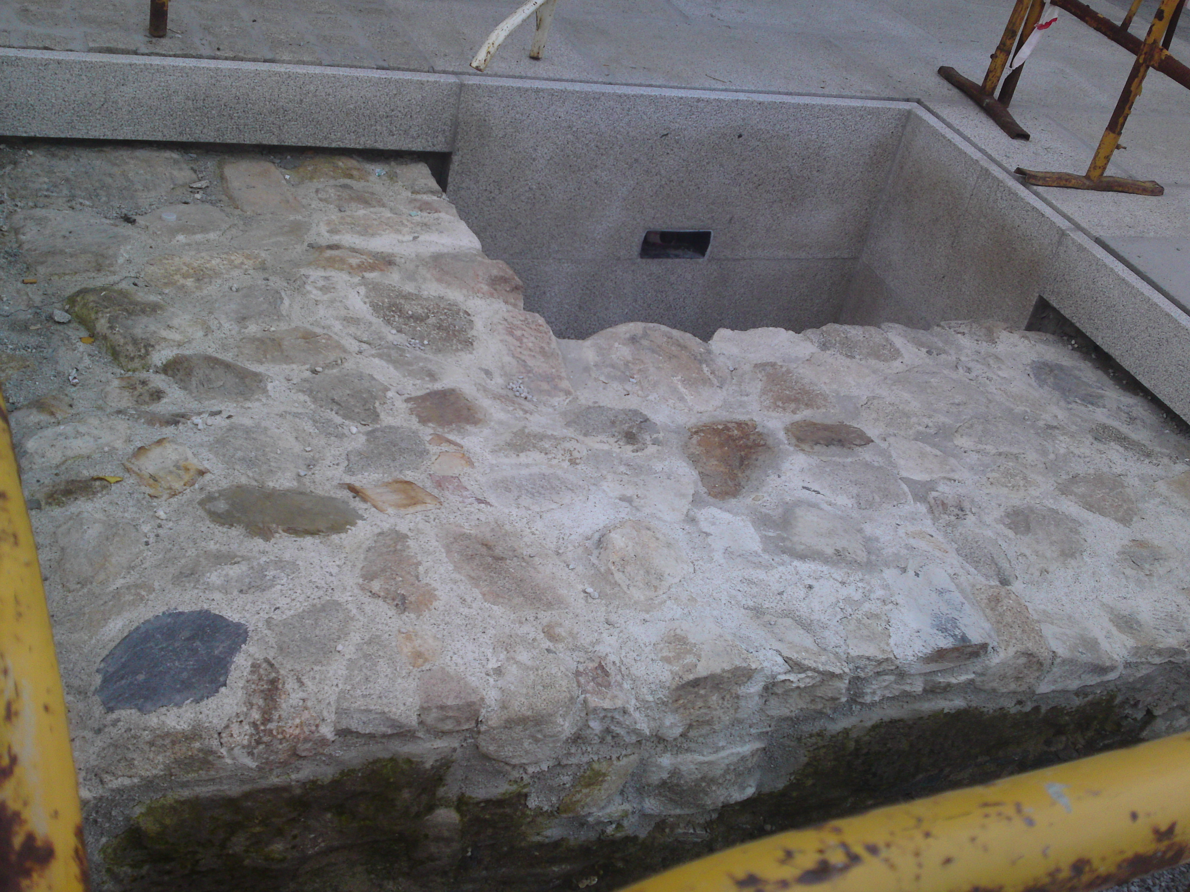 Nuevo! Trozo de muralla descubierta